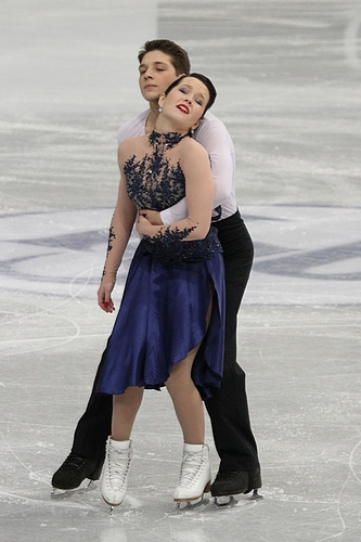 Адрианн Пулин и Марк-Андре Сервант (Канада) на чемпионате мира по фигурному катанию среди юниоров 2012